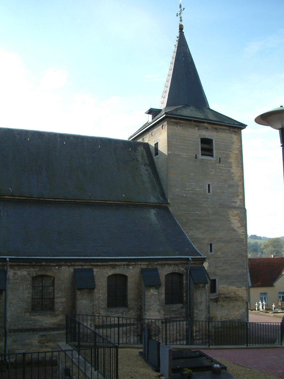 Schin op Geul, St. Mauritiuskerk